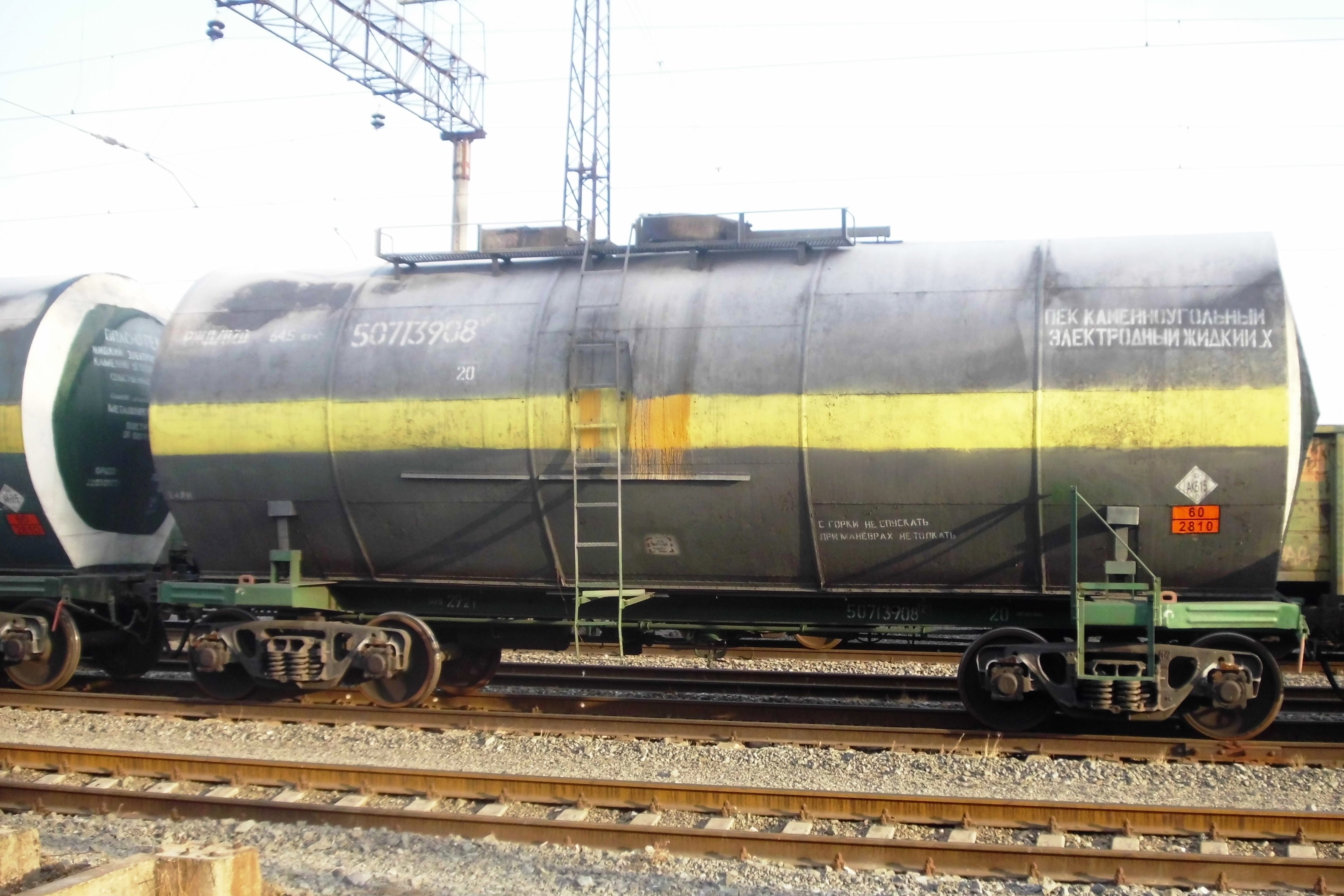 4-х осный вагон-цистерна для каменноугольного пека с ТЭНами в нижней части для подогрева. Россия.